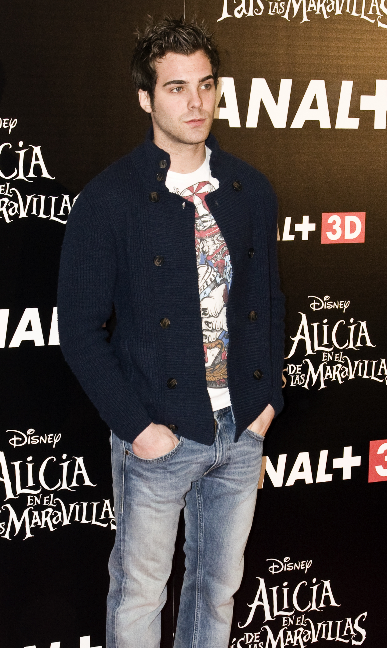 José Ángel Trigo